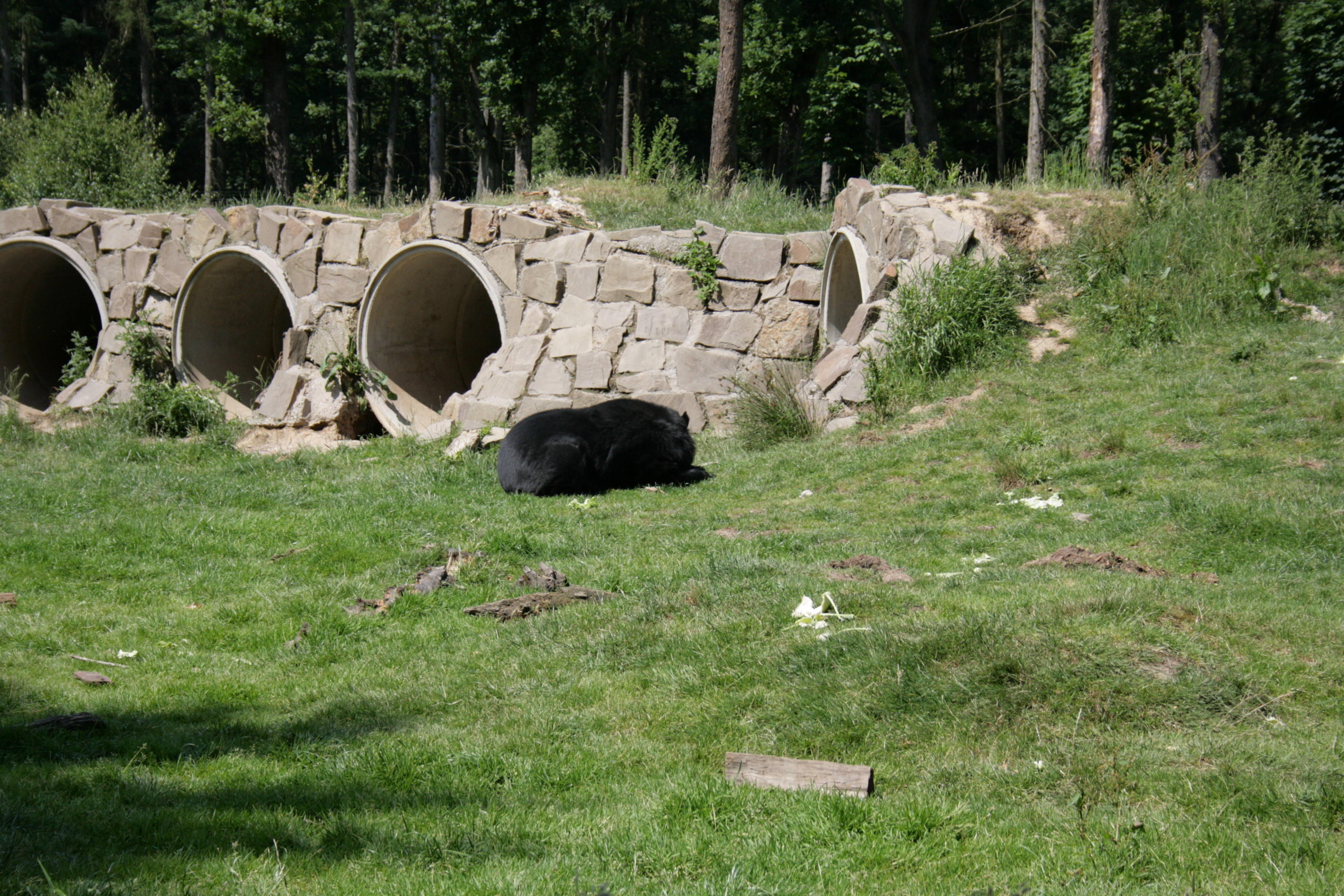 Anholter Schweiz in Anholt, Isselburg